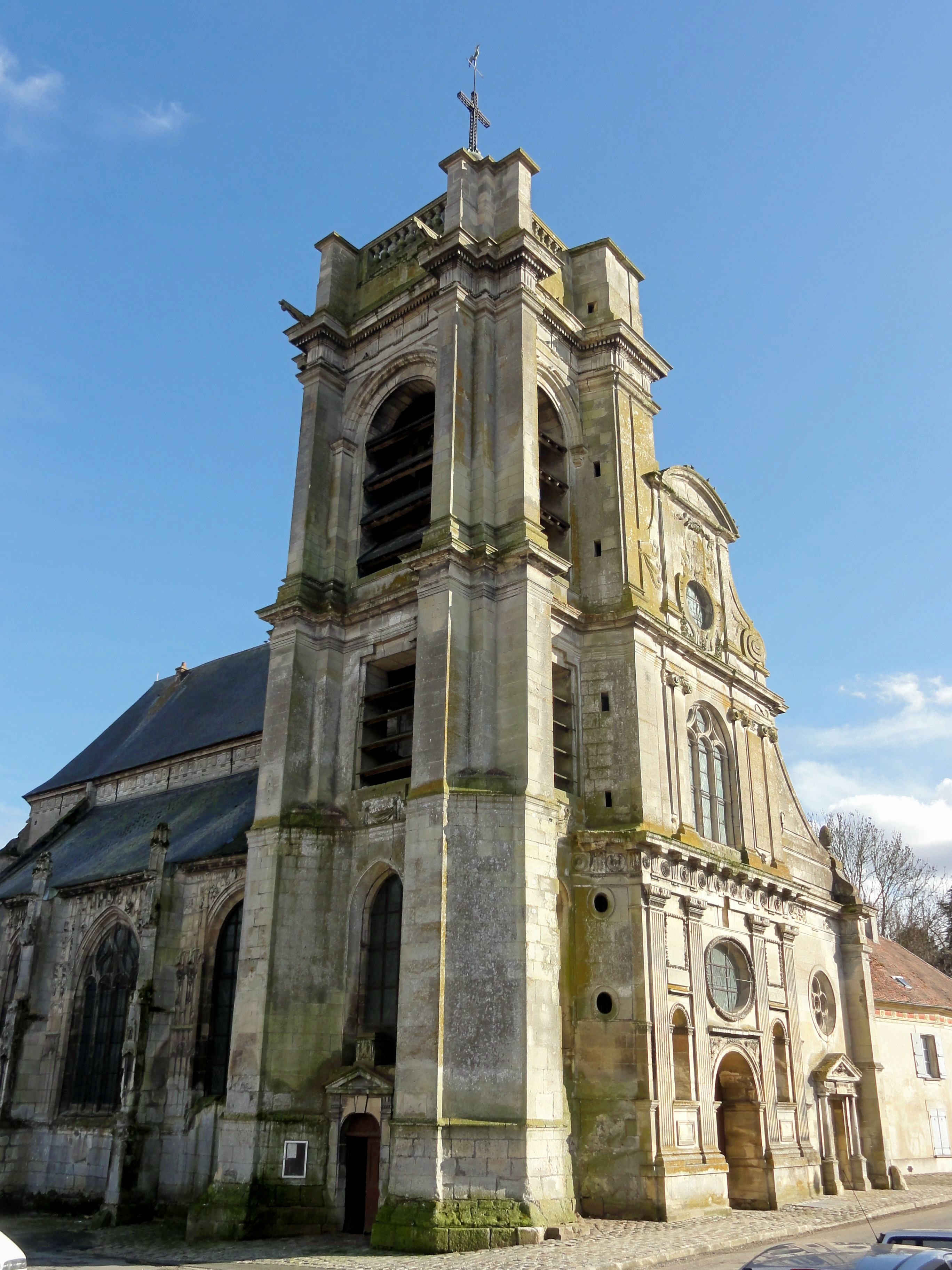 Vue partielle depuis le nord-ouest.